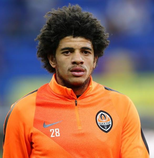 Тайсон під час виступів за Шахтар